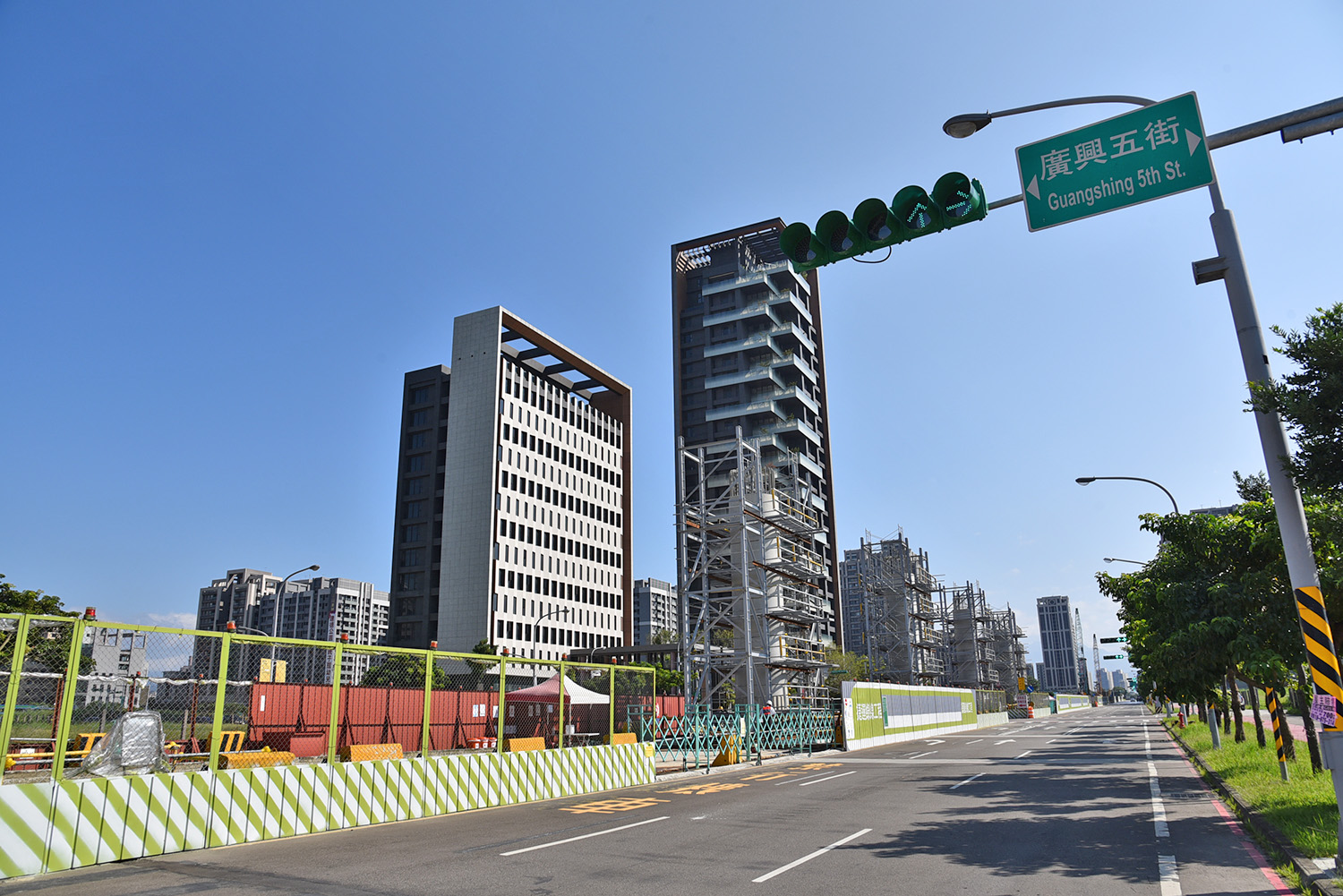 中文（台灣）: 桃園捷運綠線八德高架段施工